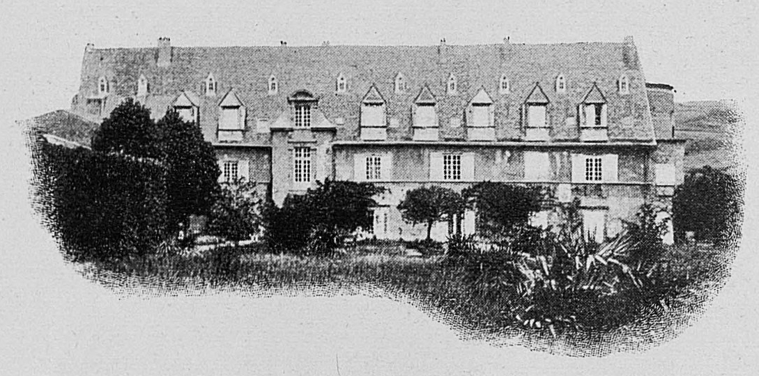 Dictionnaire illustré des communes du département du Rhône. Tome 1 / par MM. E. de Rolland et D. Clouzet.